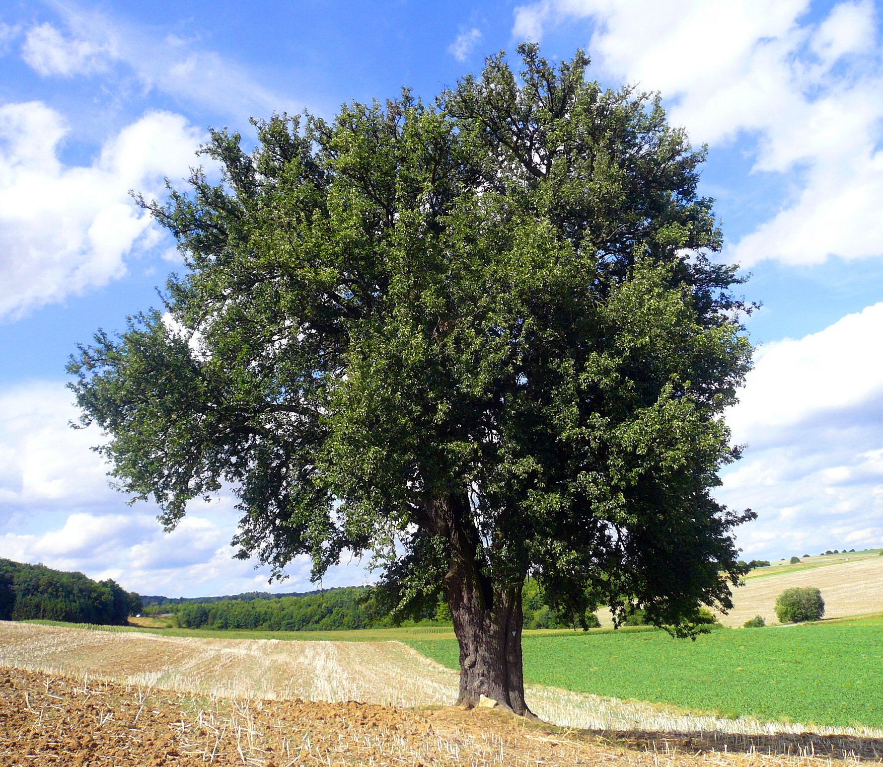 Birnbaum am Lerchenberg bei Wasserlosen. Die Kultur-Birne (Pyrus communis) hat einen Stammumfang von 4,6 Meter und etwa 17 Meter Kronendurchmesser und Höhe. Sie ist bei der Unteren Naturschutzbehörde des Landkreises Schweinfurt mit der Bezeichnung ND-05801 als Naturdenkmal gelistet.